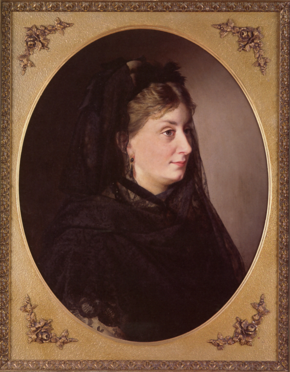 Porträt einer Dame (1851) von Josef Mánes, Öl auf Leinwand, 64,5 x 54,5 cm, Sammlung Kooperativa